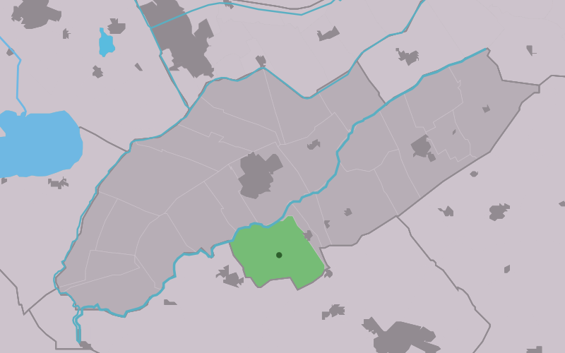 Kaartsje fan himrik fan Blesdike